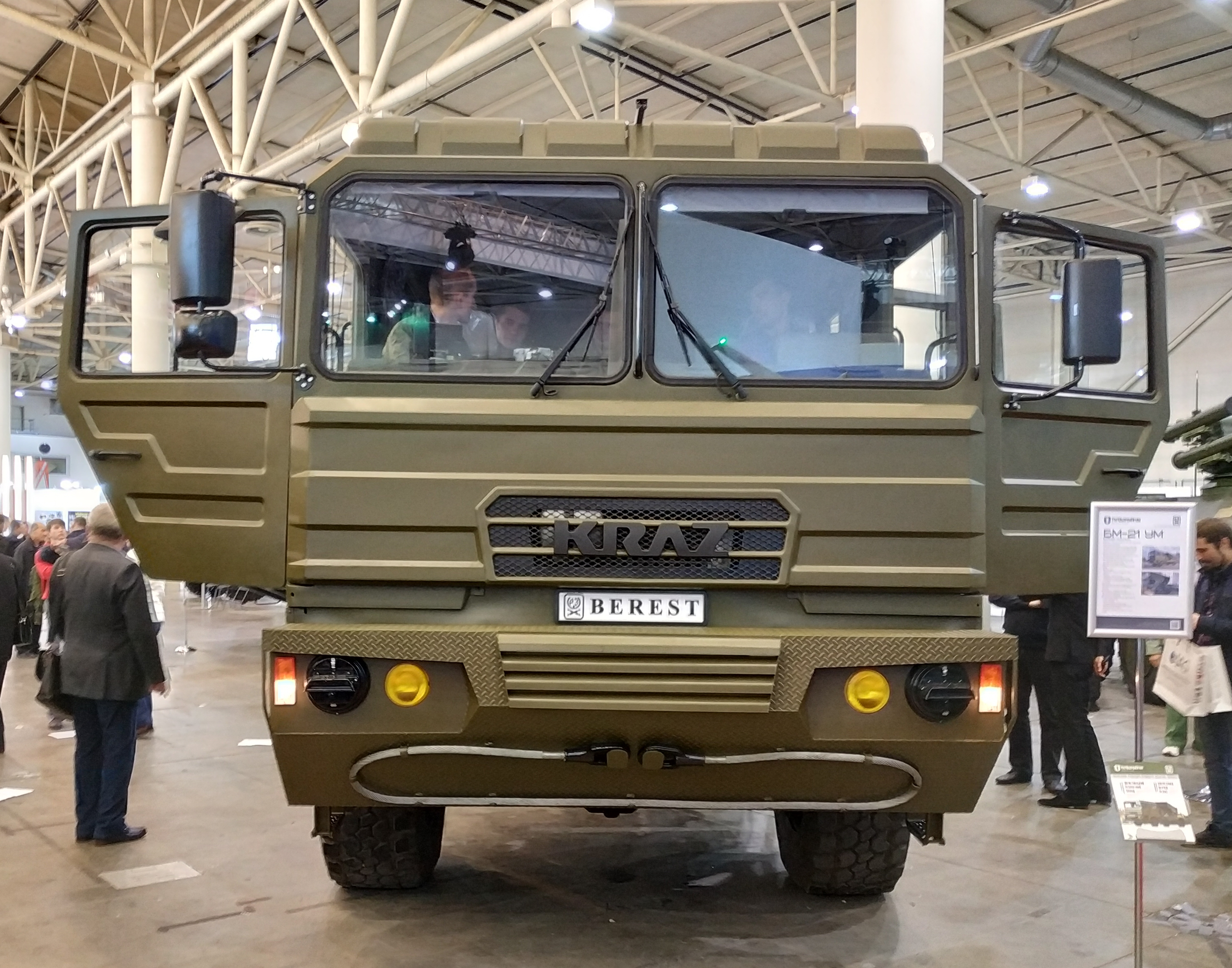 Реактивная система залпового огня БМ-21УМ "Берест" в экспозиции Шепетовского ремонтного завода. Выставка "Зброя та безпека", Киев, октябрь 2018 г.